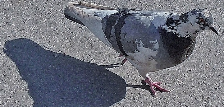 Нзвичайне забарвлення Сизого Голуба